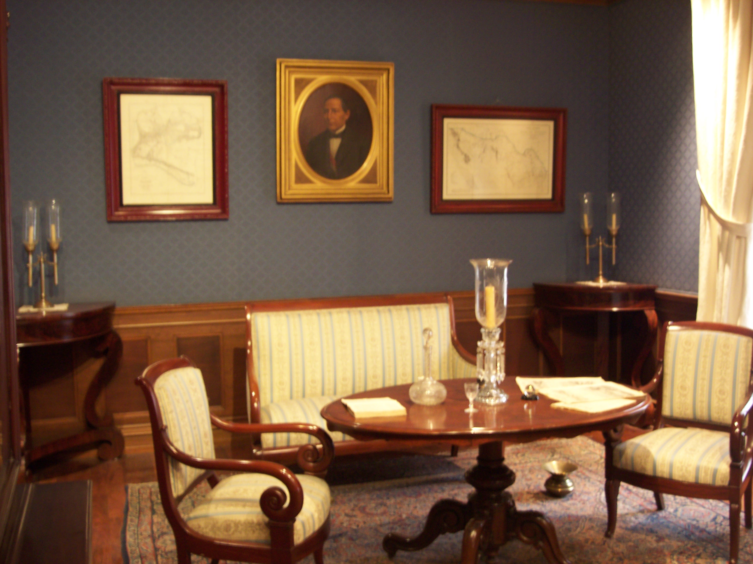 Recreación del Estudio o Gabinete. Photo taken in Benito Juárez Museum. National Palace. D. F. Mexico SPANISH: Fotos tomadas en el Recinto a Juárez. Palacio Nacional. México D.F.